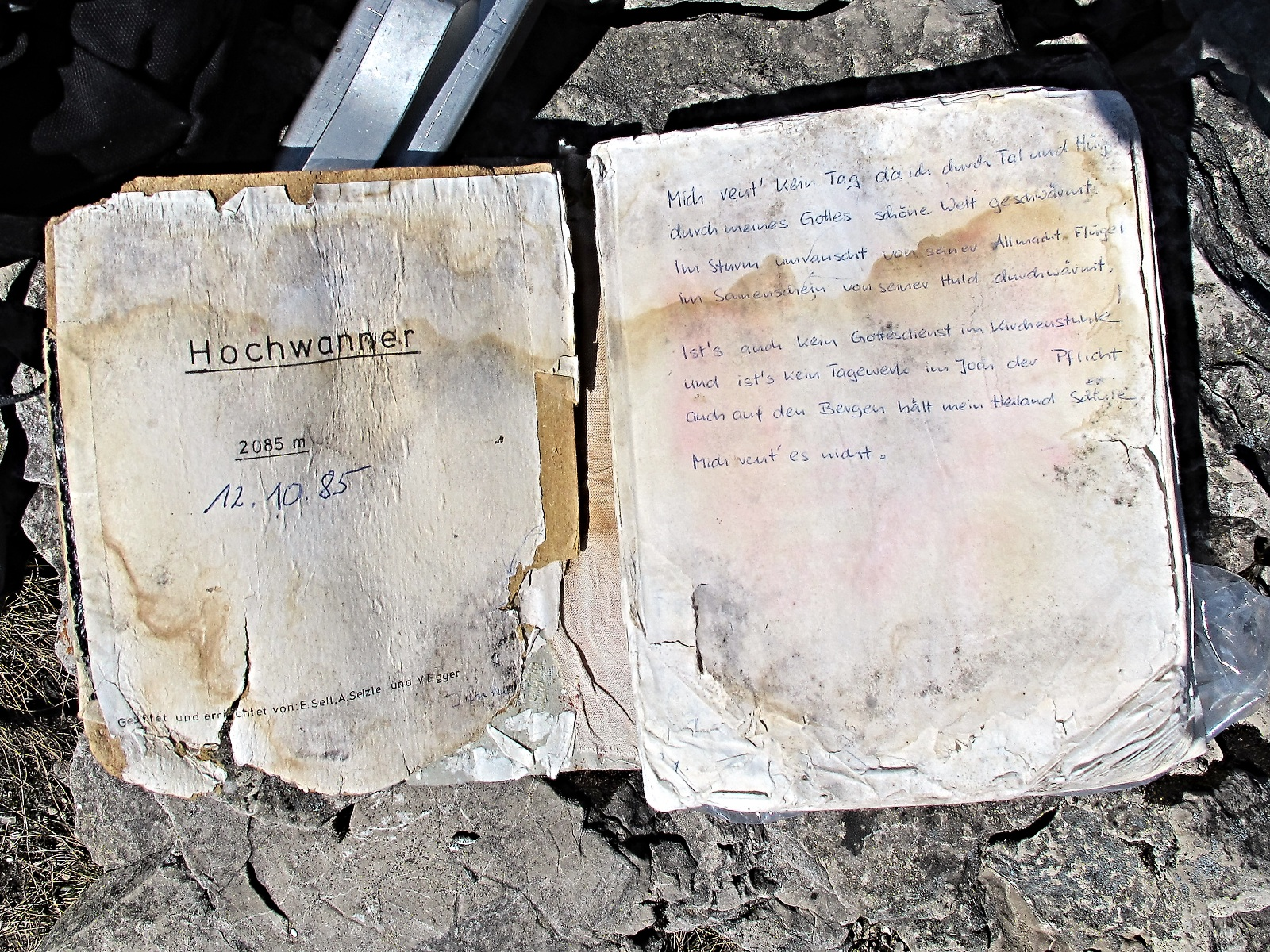 Gipfelbuch auf dem Hochwanner (Ammergauer Alpen)